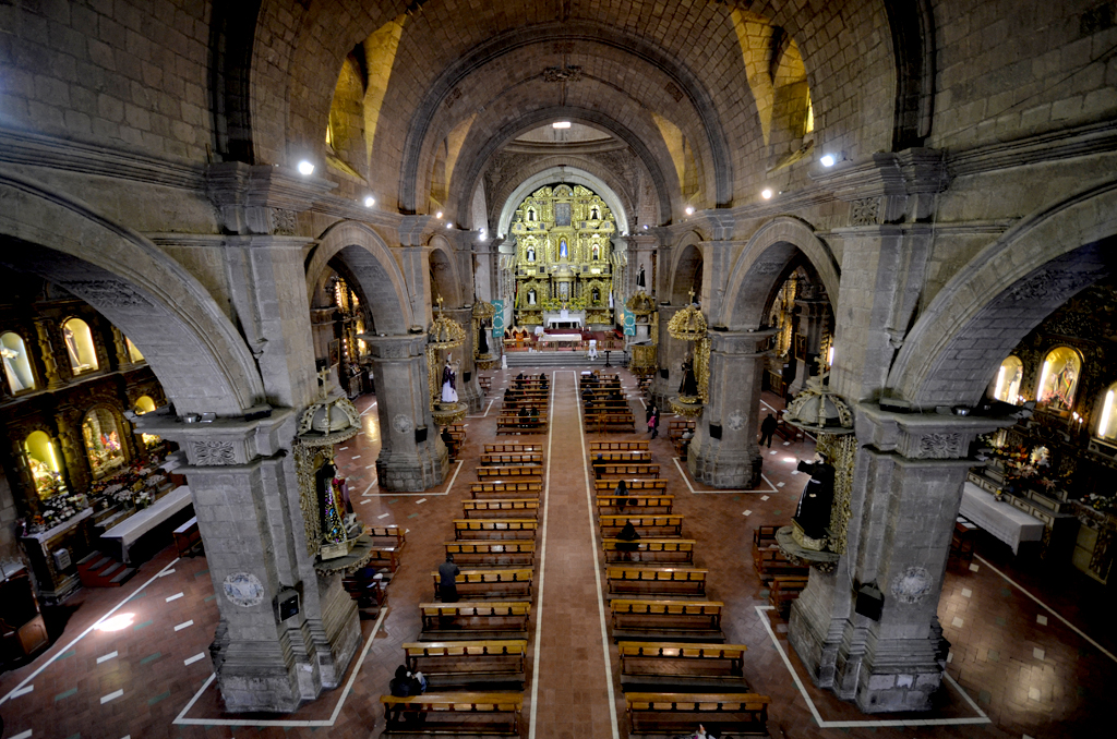 Complejo San Francisco This medium shows the protected monument with the number L/00-107 in Bolivia.